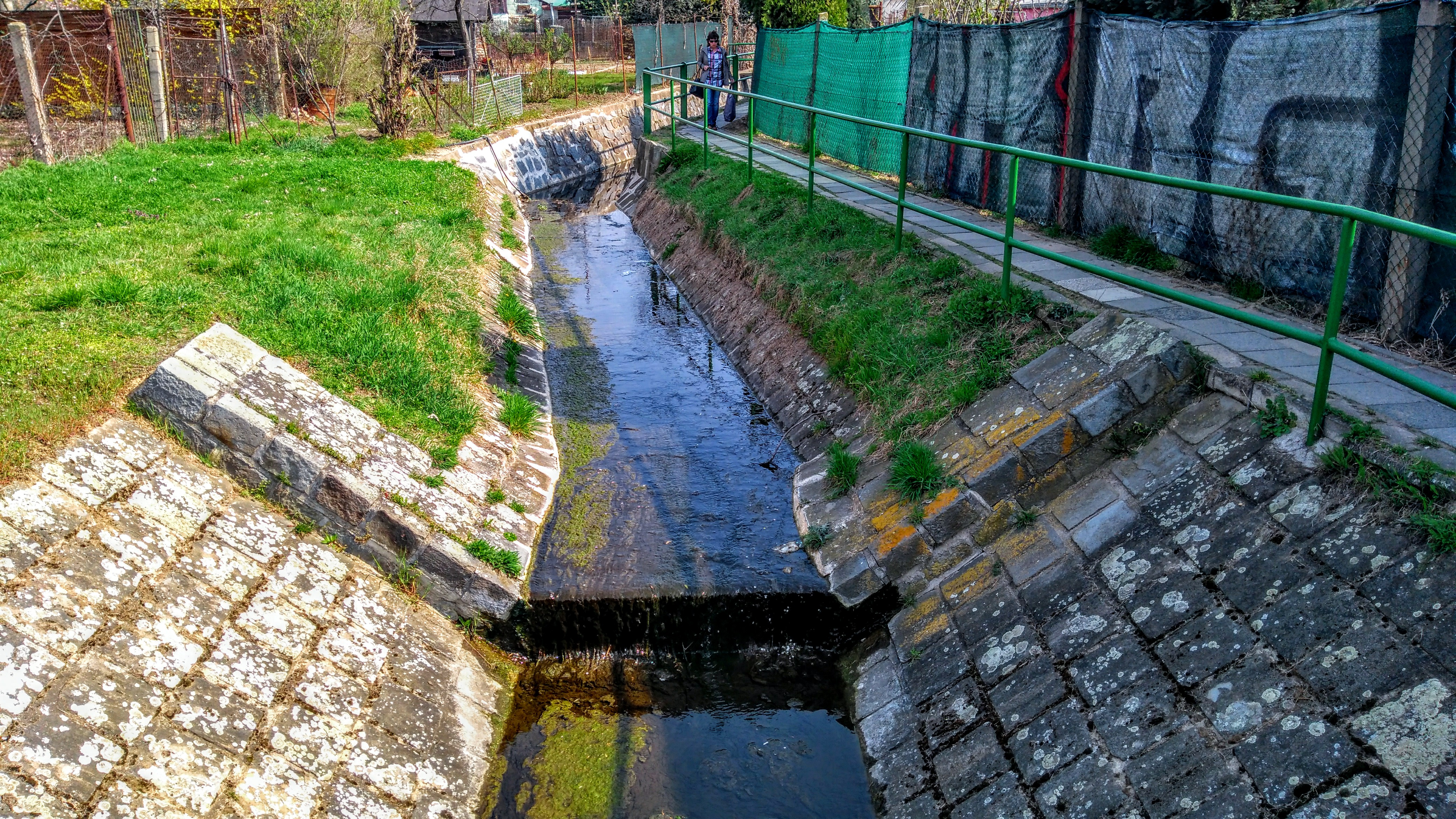 Komínský potok ve čtvrti Komín u tramvajové trati.